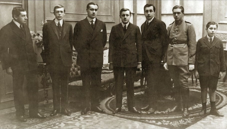 Fotografía tomada en 1920 antes de asumir como presidente, donde aparece Arturo Alessandri junto a sus seis hijos varones. De izquierda a derecha: Arturo, Jorge (futuro presidente de Chile en 1958); Fernando; Eduardo; Hernán; Eduardo y Mario Alessandri Rodríguez. Fuente: Museo Histórico Nacional (extractada de la Revista Sucesos de 1920).